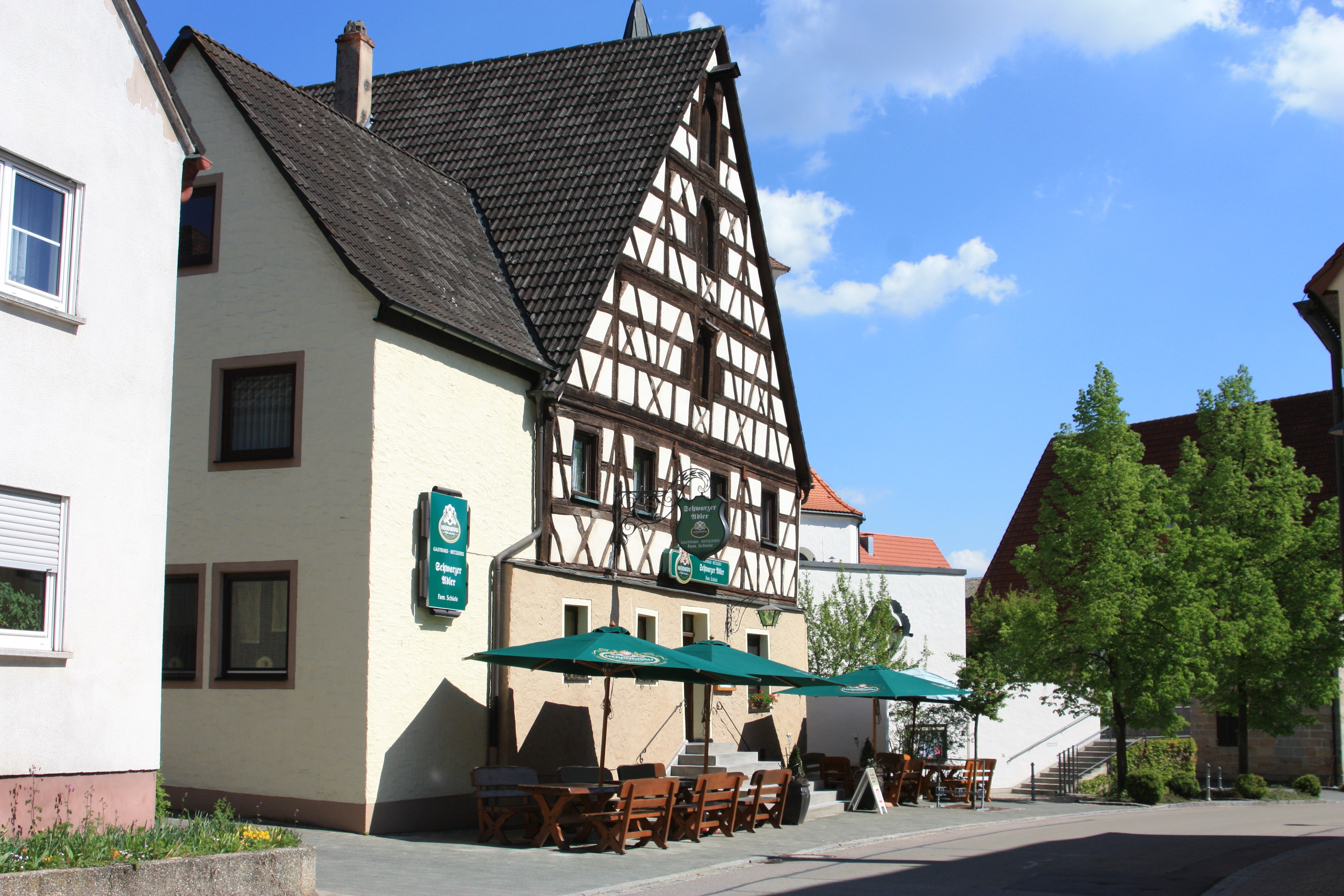 Pleinfeld Stirn Gasthaus, 17. Jh., Hauptstraße 21